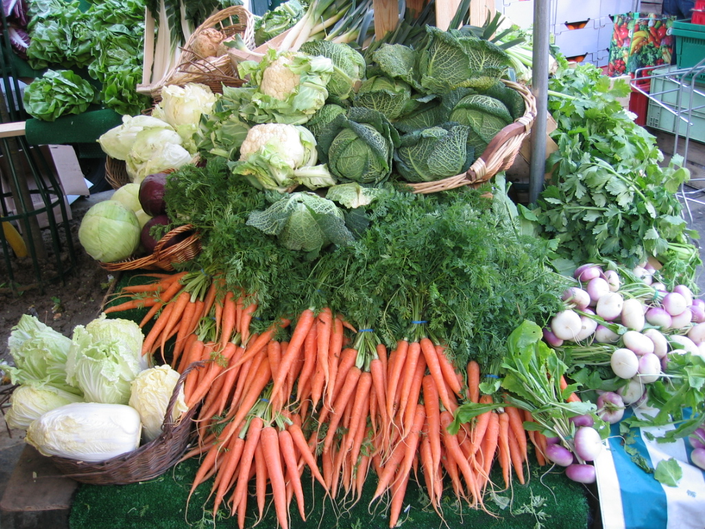 Légumes